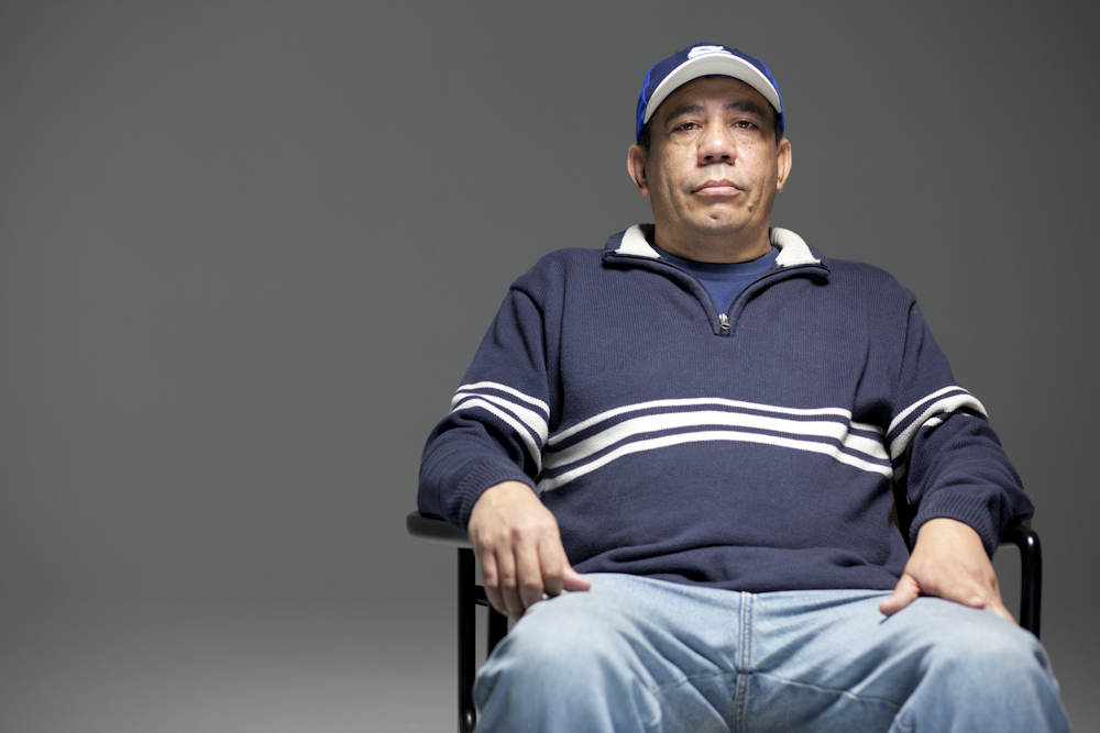 Foto tirada em 27/05/2010 pelo Garapa - Coletivo Multimídia ( Sérgio Vaz em entrevista ao projeto Produção Cultural no Brasil: Sérgio Vaz é poeta e fundador da Cooperifa